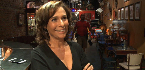 Andréa Vianna Beltrão[1] (Rio de Janeiro, 16 de setembro de 1963) é uma atriz, comediante, cineasta, jornalista e escritora brasileira de cinema, teatro e televisão. Na foto, Andréa Beltrão está no set do filme "Pequeno Dicionário Amoroso 2"